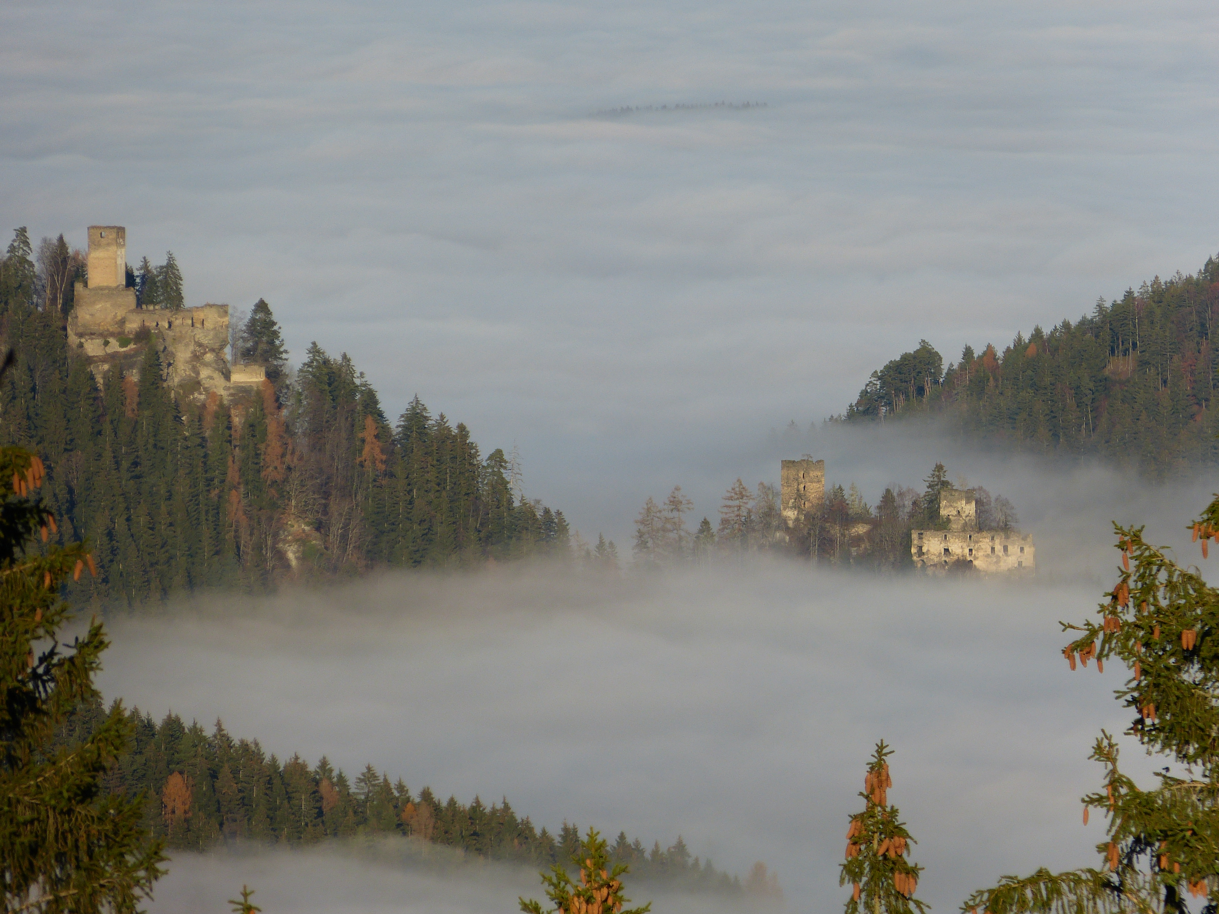 Burgruinen Hochkraig und Niederkraig (Gemeinde Frauenstein, Kärnten); über Nebel.